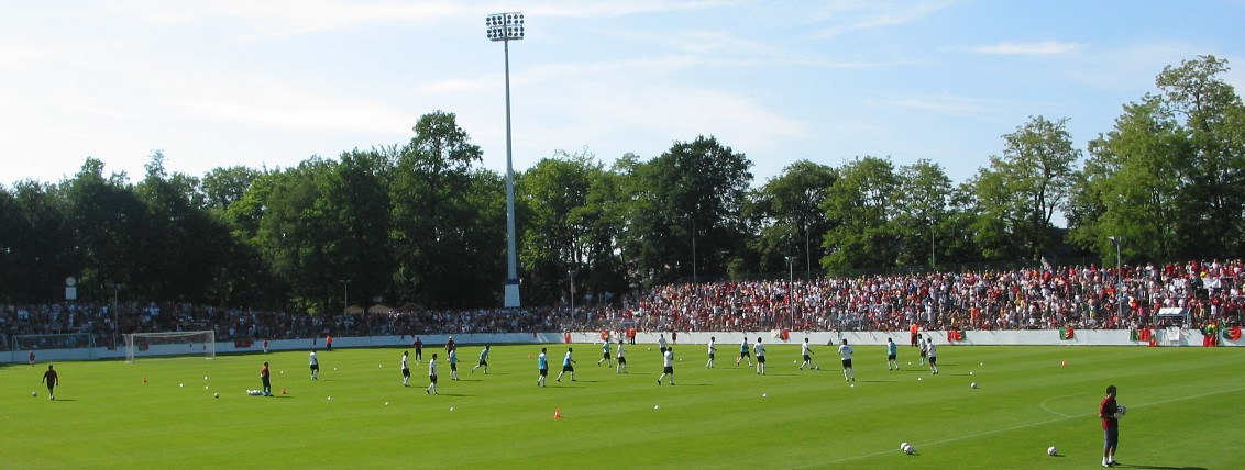 Blick in das Heidewaldstadion während des öffentlichen Trainings der Nationalmannschaft Portugals.